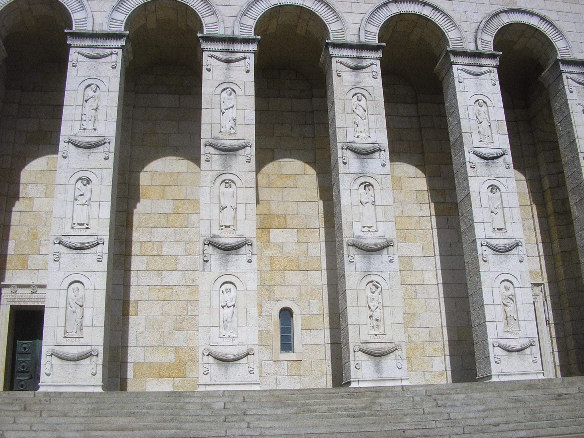 Église réformée à Soleure : les piliers